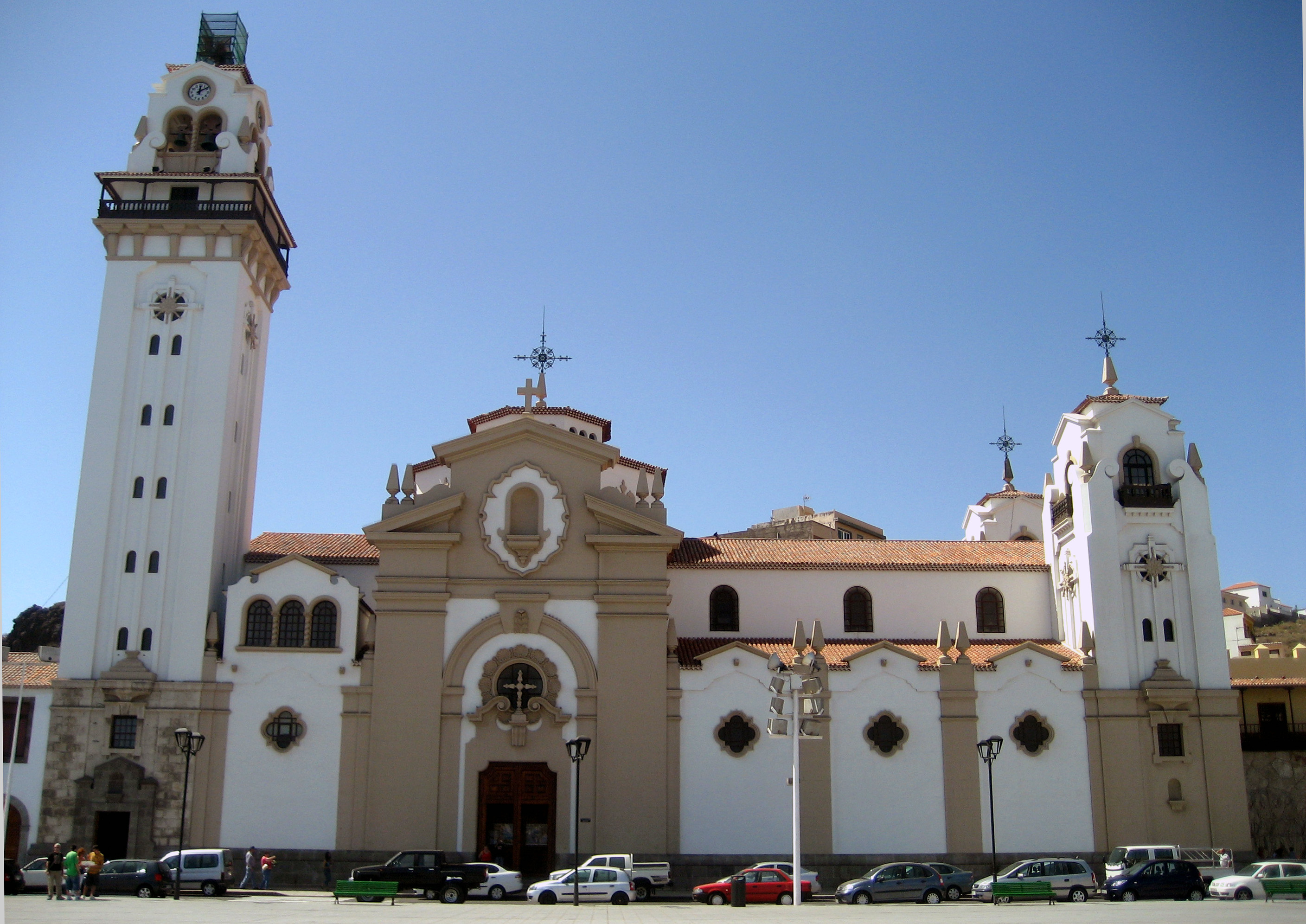 Basílica de Candelaria en la ciudad de Candelaria en Tenerife.Canarias.